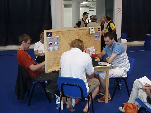 Slovenskí bridžoví juniorskí reprezentanti Sidor a Kianica vľavo a vpravo a ME družstiev juniorov v meste Jesolo